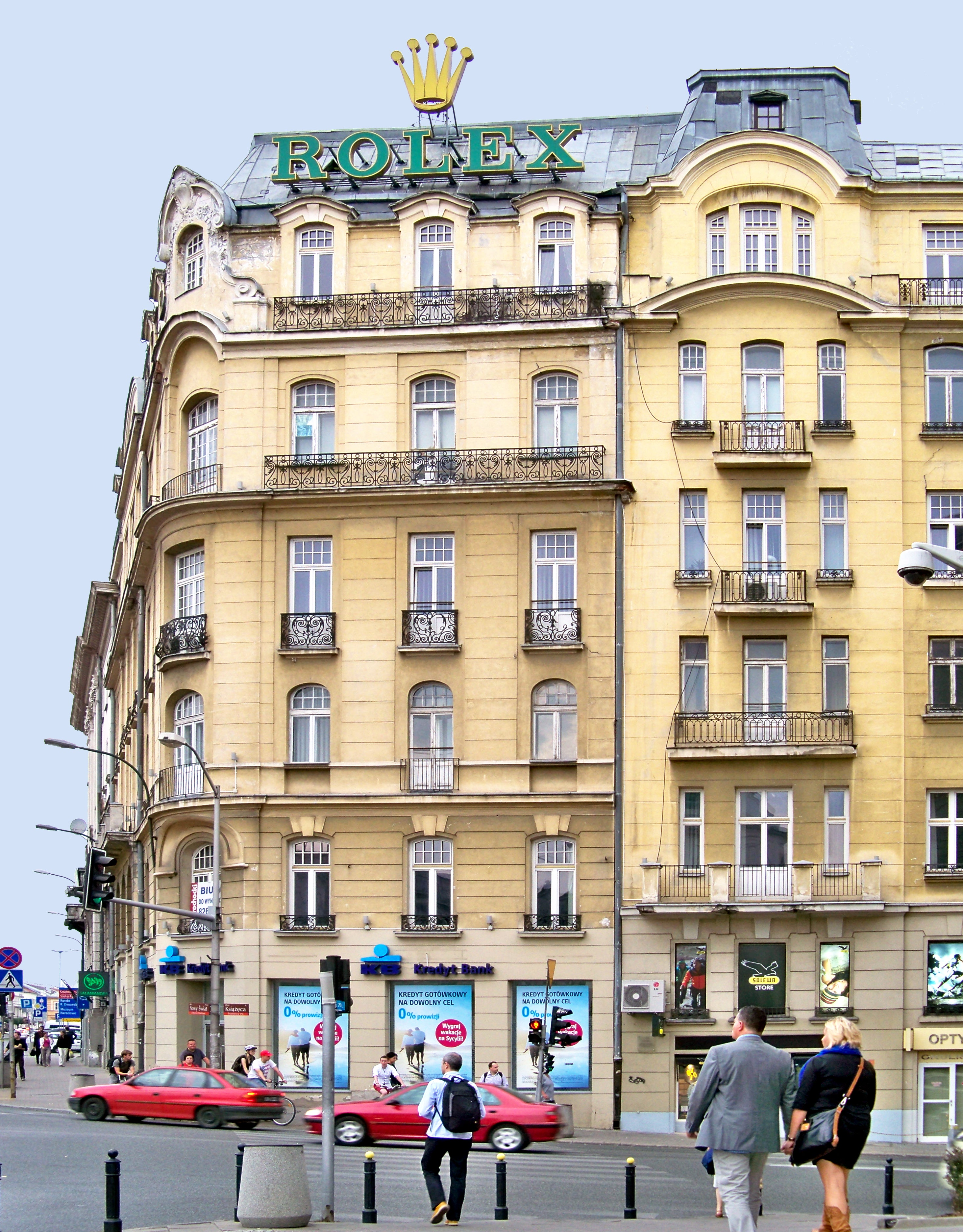 Nowy Świat 2 w Warszawie, róg Książęcej.